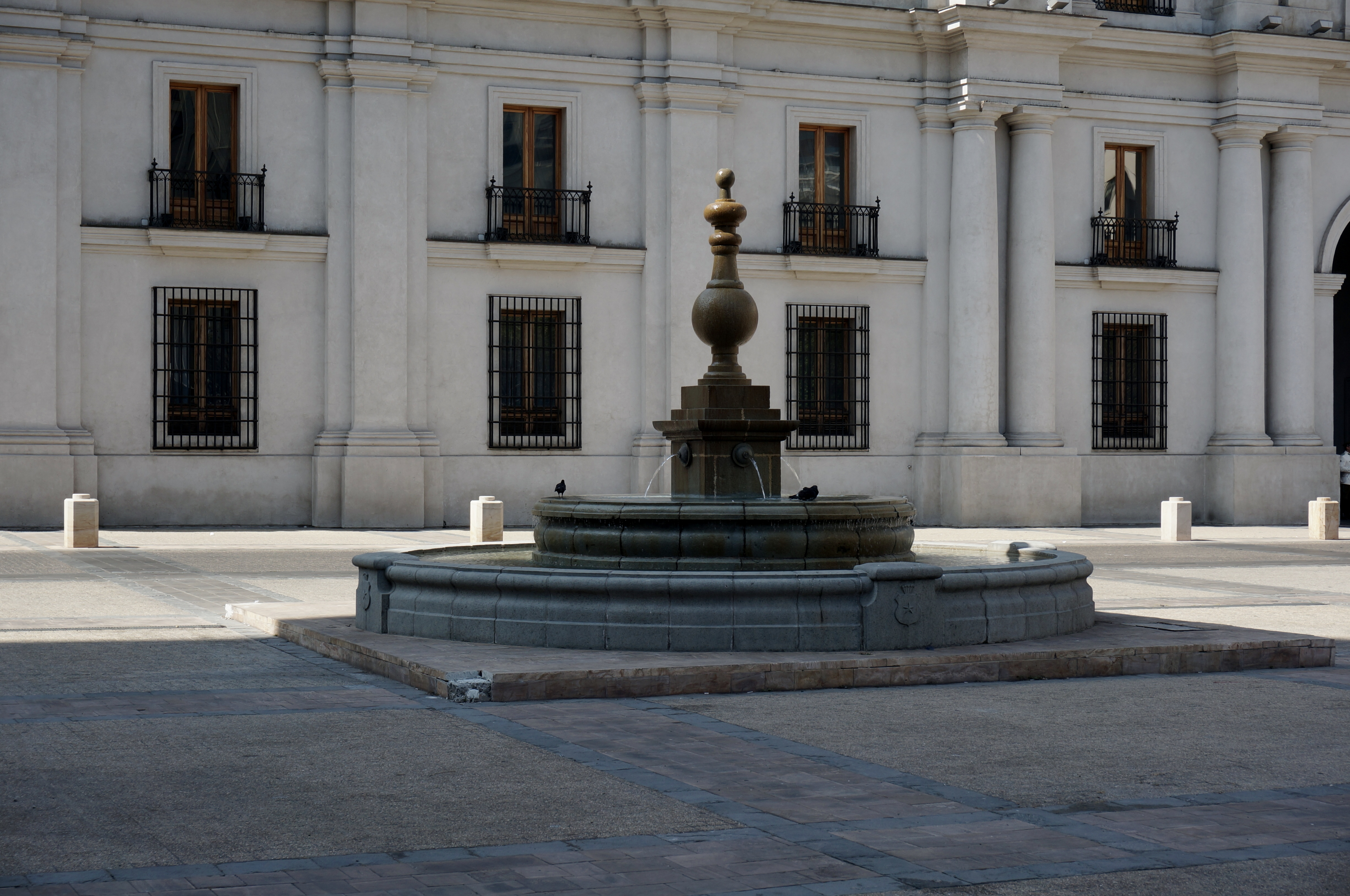 Fuente (lado oriente) frente a la fachada norte del La Moneda, en la plaza de la Constitución, Santiago de Chile. En la plaza hay dos fuentes, Las dos fuentes, ambas inspiradas en la imagen de un grabado antiguo.